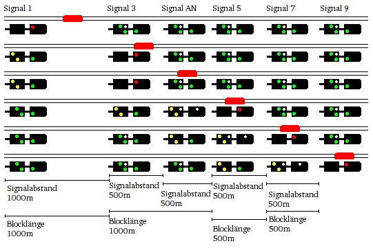 Halbregelabstand bei der deutschen Bahn